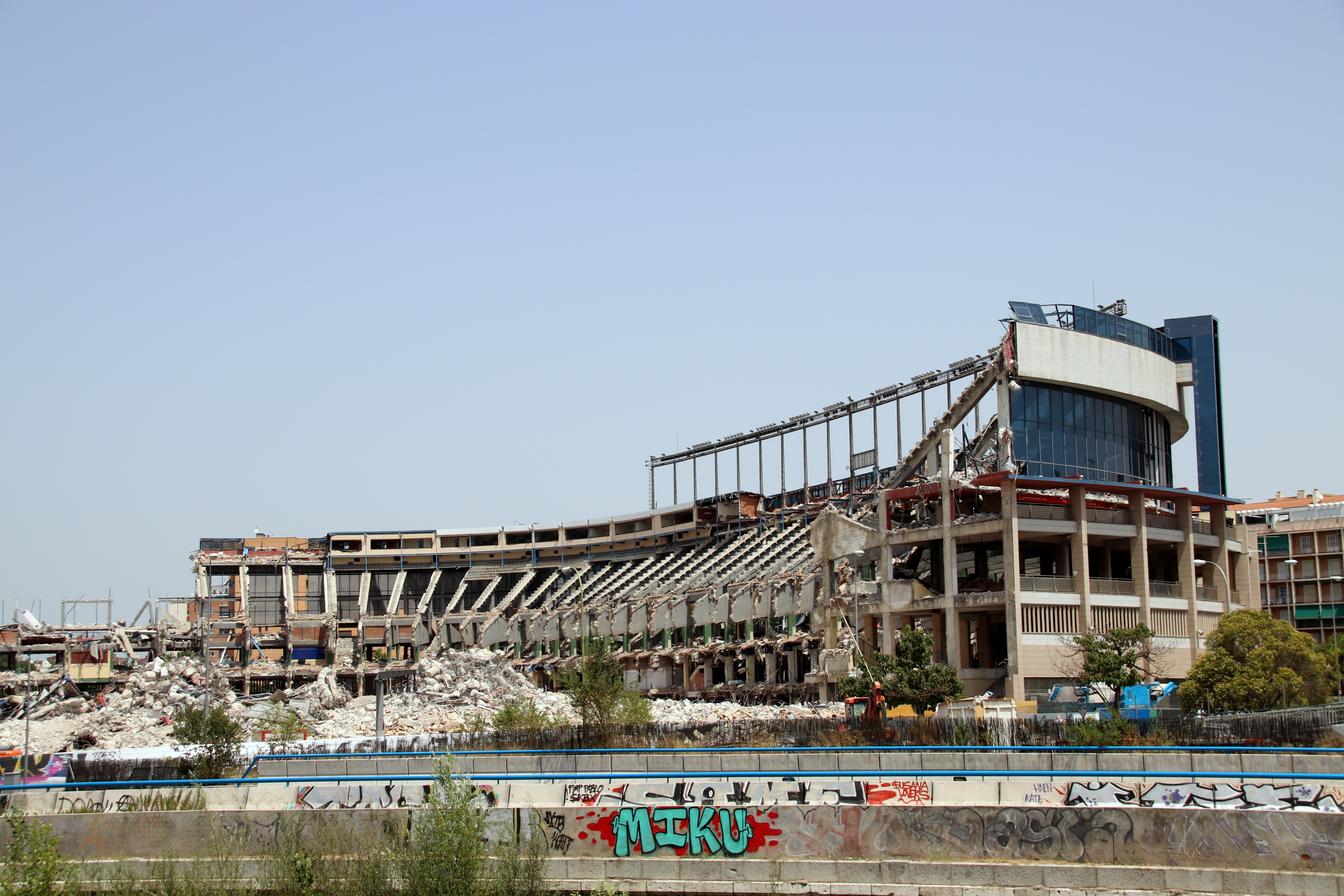 Estadio Vicente Calderón durante su demolición